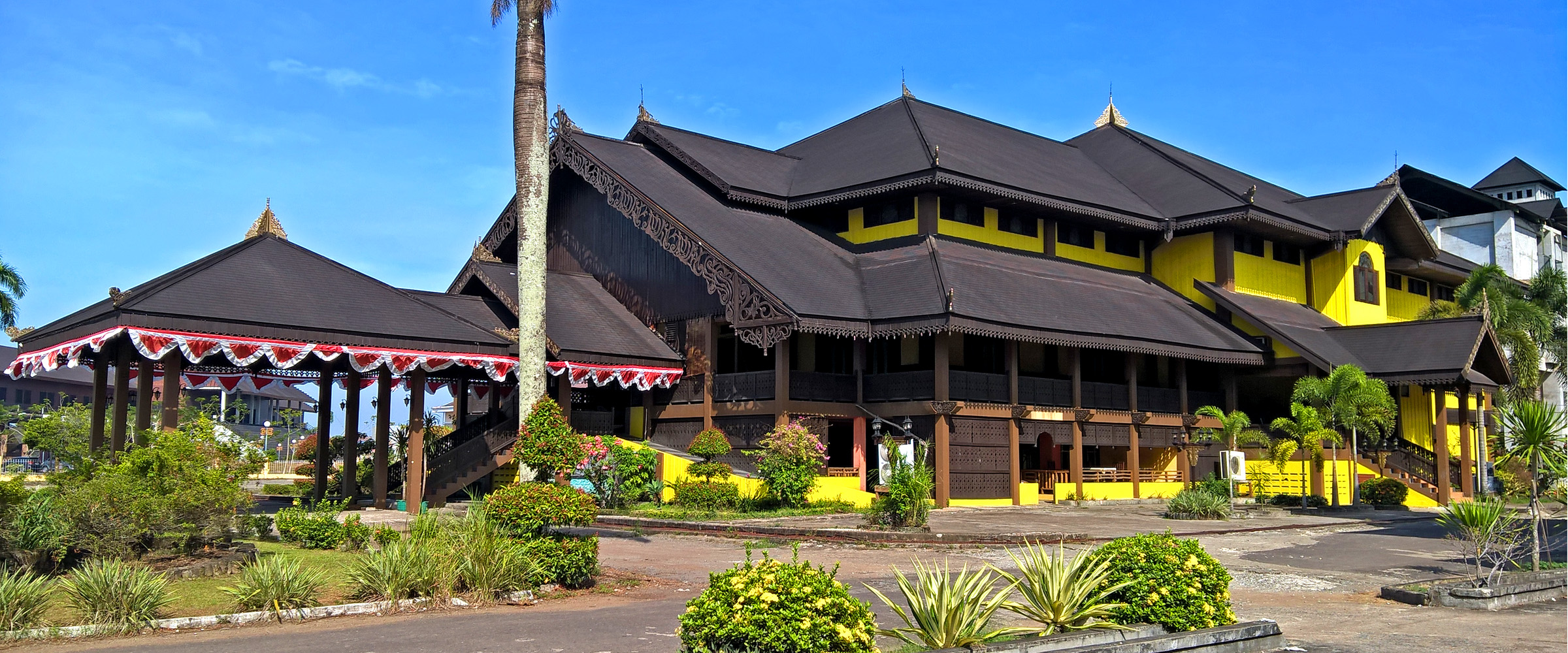 Beralamat di Jl. Sutan Syahrir, Kel. Sungai Bangkong, Kec. Pontianak Kota